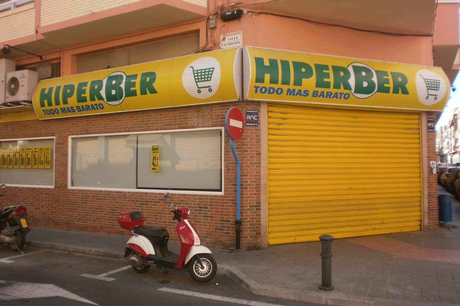 Supermercado Hiperber en la calle Escorpión, Alicante, España.